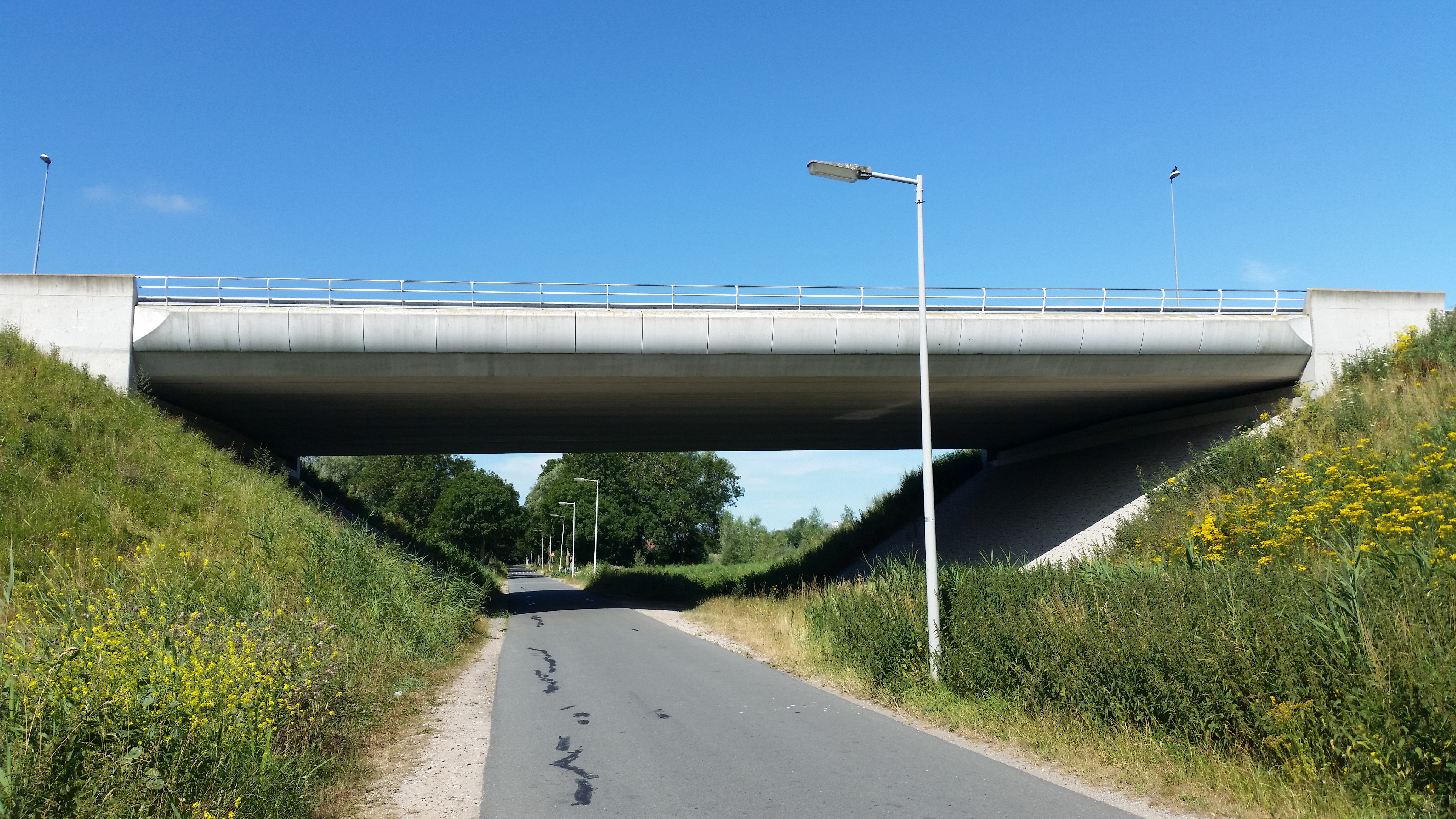 Viaduct (kunstwerk 512a) in de Rijksweg 5/Westrandweg over de Tom Scheursweg, Amsterdam Nieuw-West.